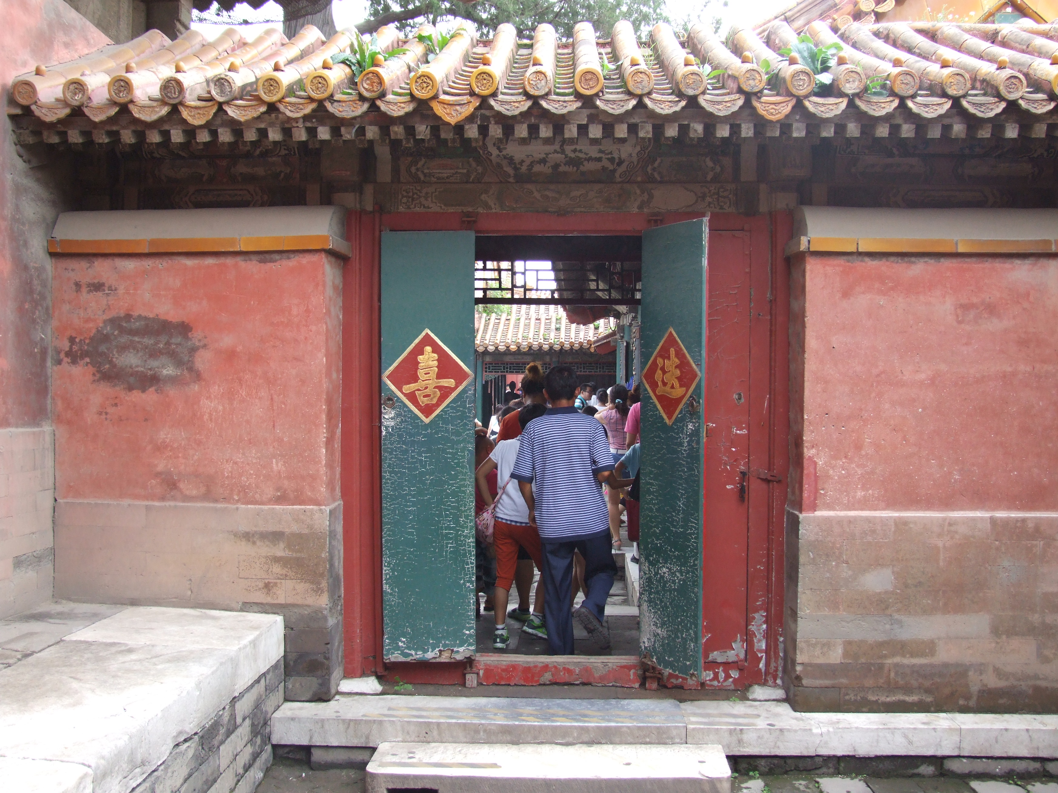 Verbotene Stadt